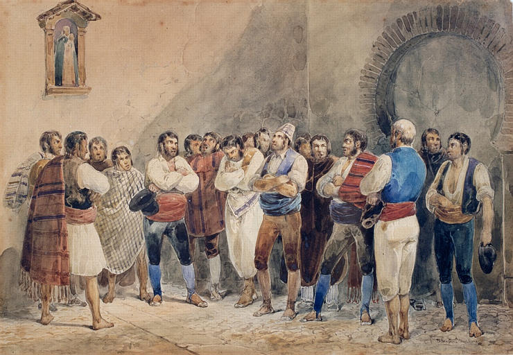 La Salve Regina de los prisioneros en una prisión de Madrid. Museo de Bellas Artes de Nantes.